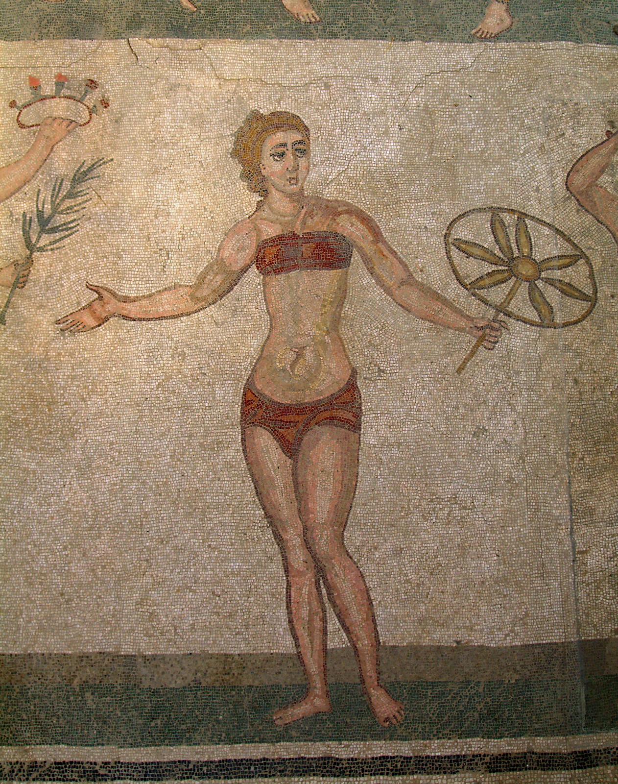 bikinimädchen, römisches Mosaik in der Villa del Casale (Sizilien)